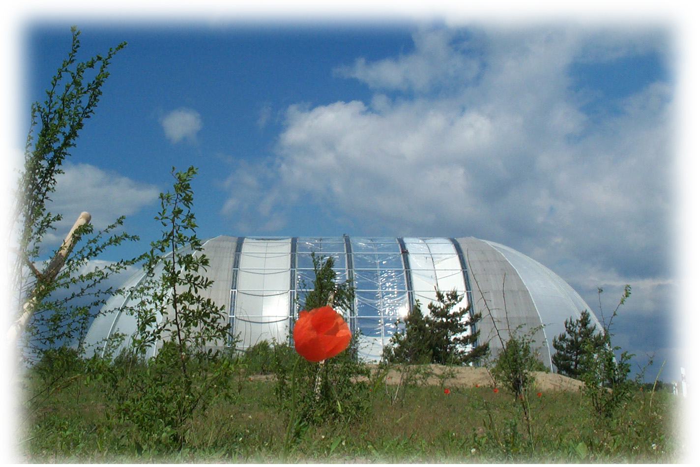 Tropical Iland